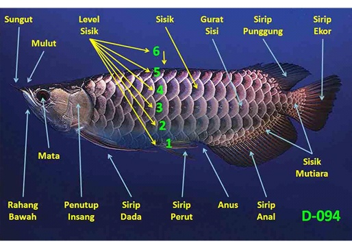 ciri-ciri fisik ikan arwana